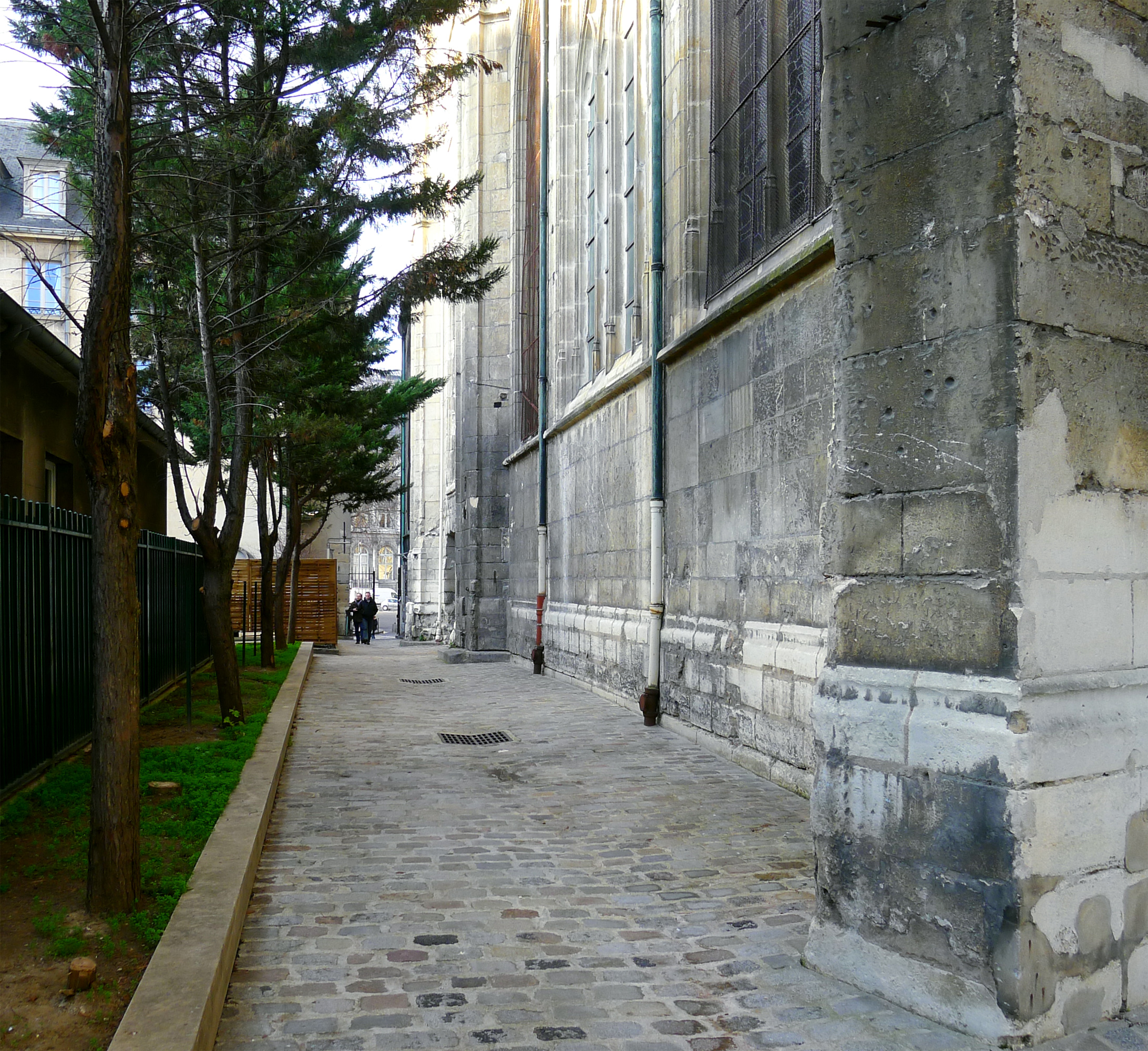 Passage du Gantelet - Paris IV